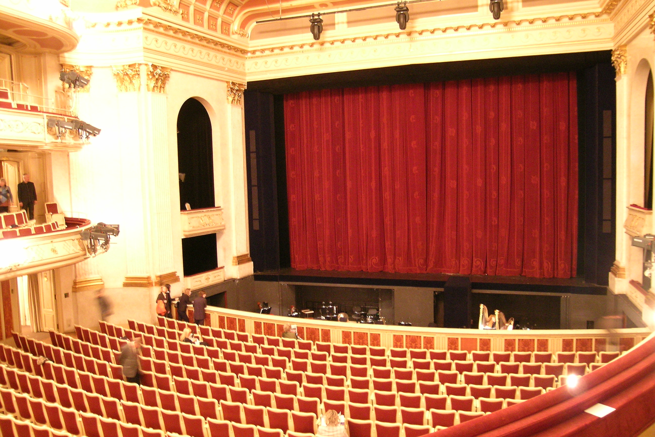 Staatsoper Berlin Unter den Linden